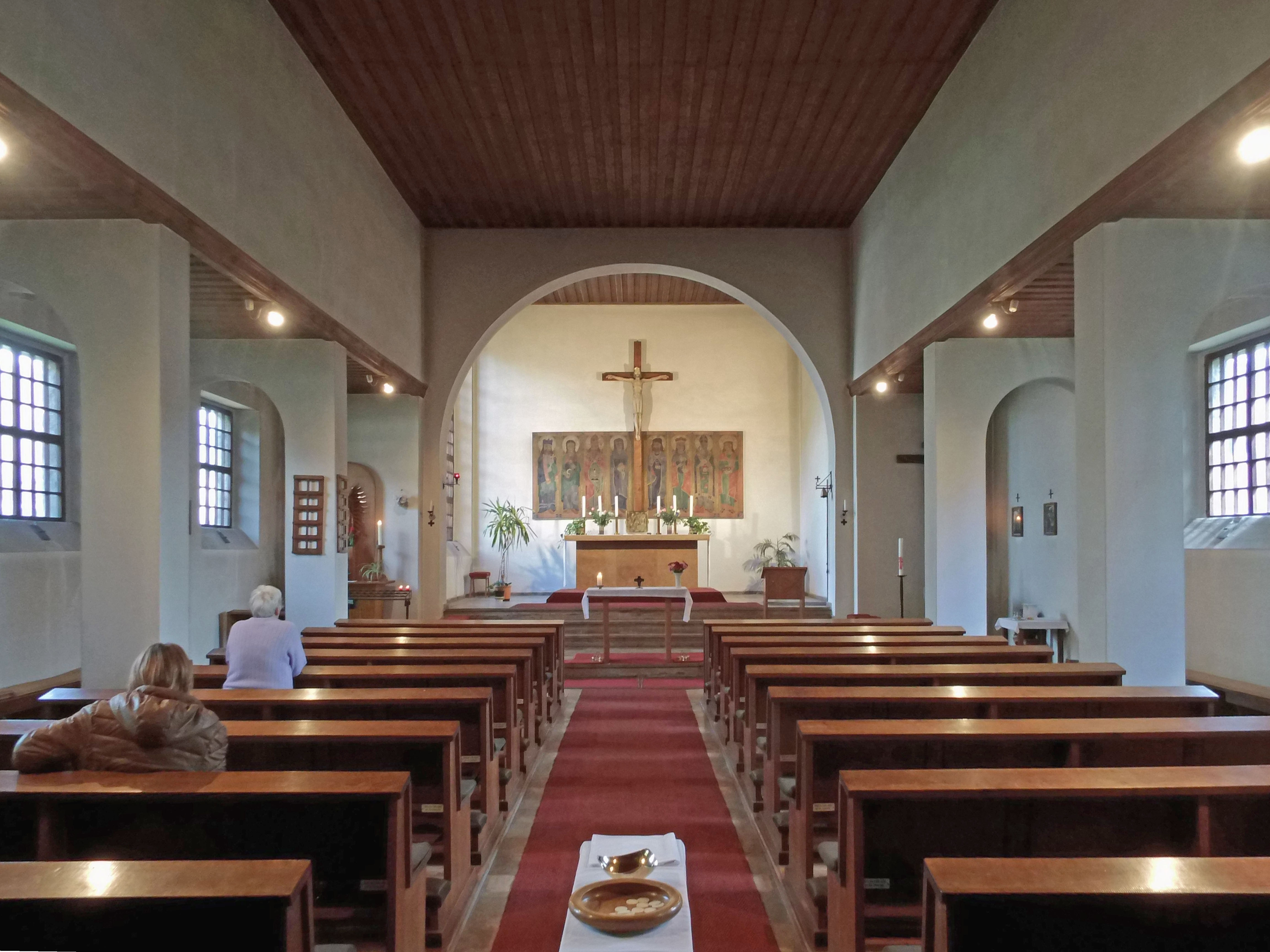 Katholische St.-Benedikt-Kirche in Eichenbarleben